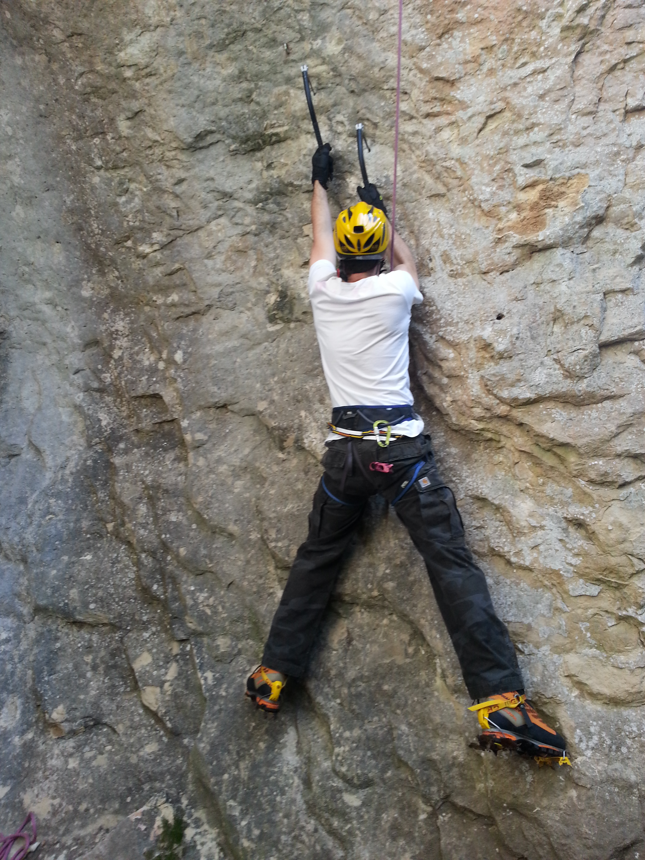 Didier B. faisant du dry-tooling dans les Alpes Maritimes (France)